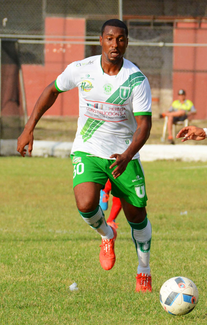 Julián Mina jugando para Liga de Portoviejo en el 2016